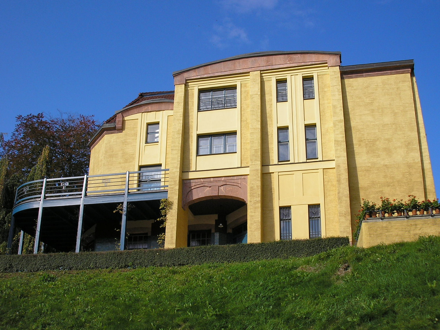 Die Villa Esche in Chemnitz (Sachsen).